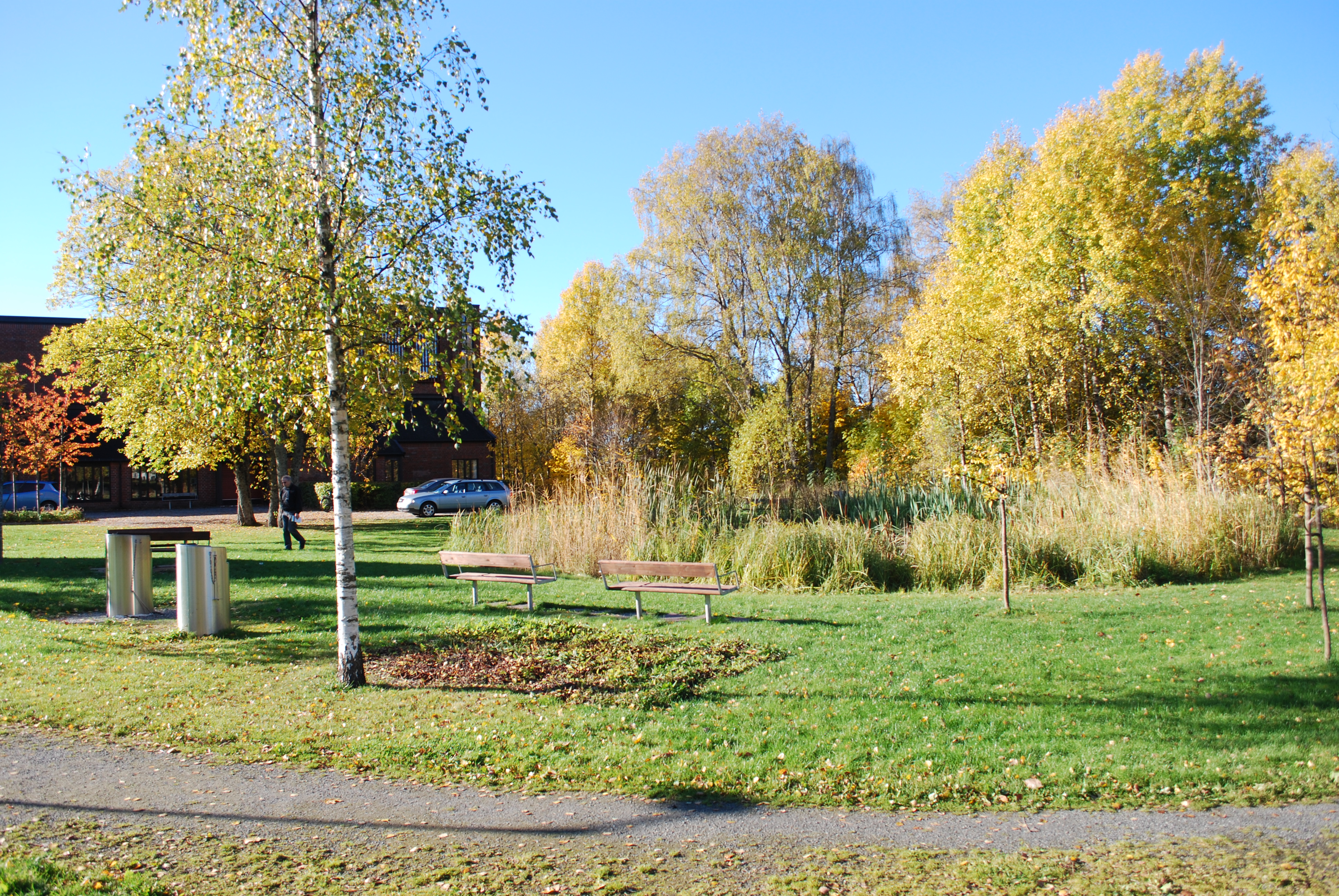 Furuset kulturpark, åpnet i 2009 ved Furuset kirke